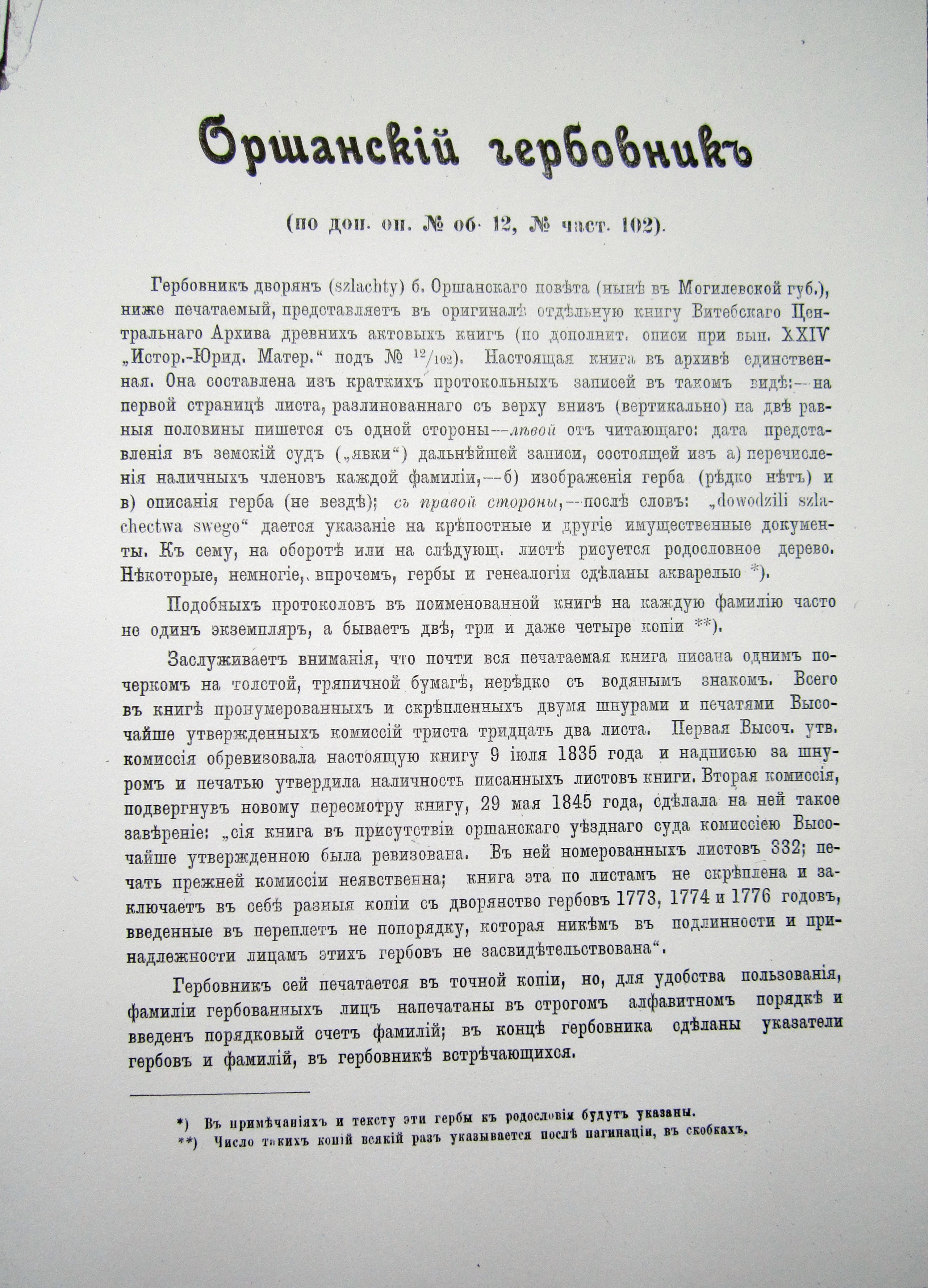 Оршанский гербовник (1900 г.)